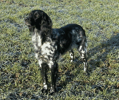 Großer Münsterländer